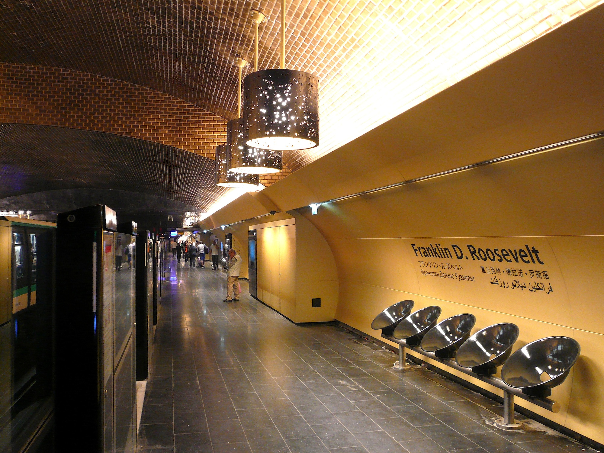 Nouvel aménagement de la station Franklin D. Roosevelt du métro parisien